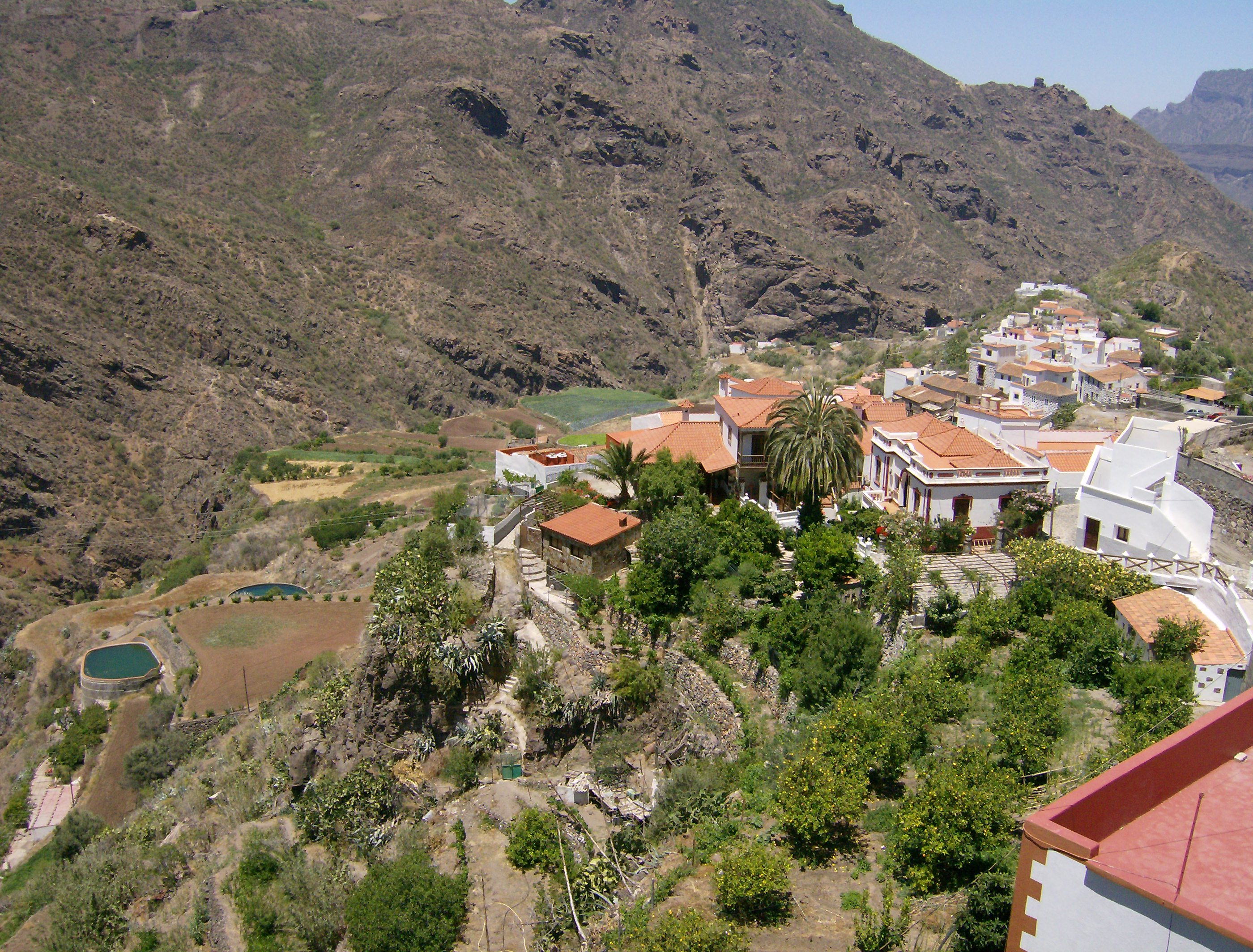 Tejeda, Gran Canaria (Canary Islands, Spain)